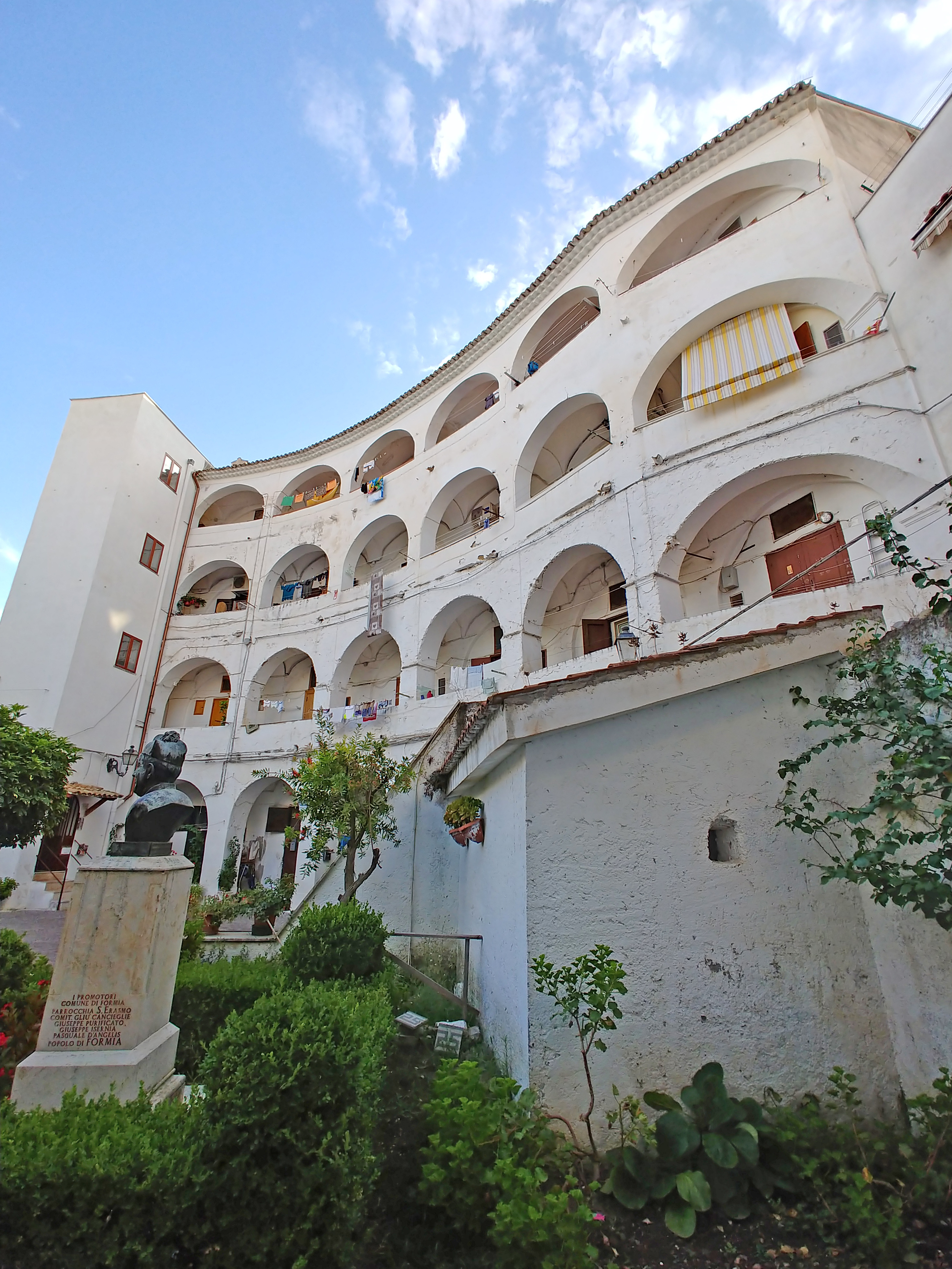 Edifici sorti sui resti dell'antico teatro romano.